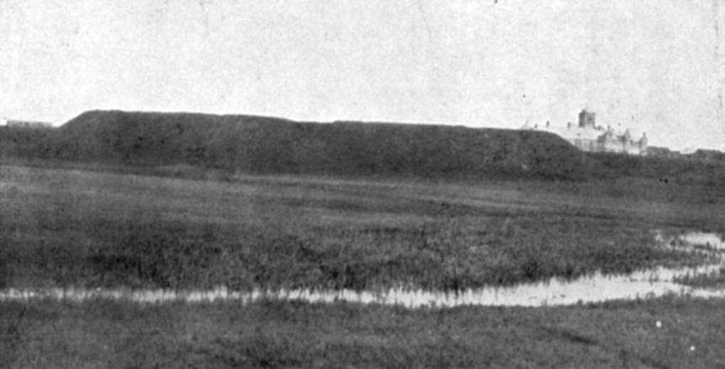 Беларуская (тарашкевіца): Клецак (Klecak). Валы замка